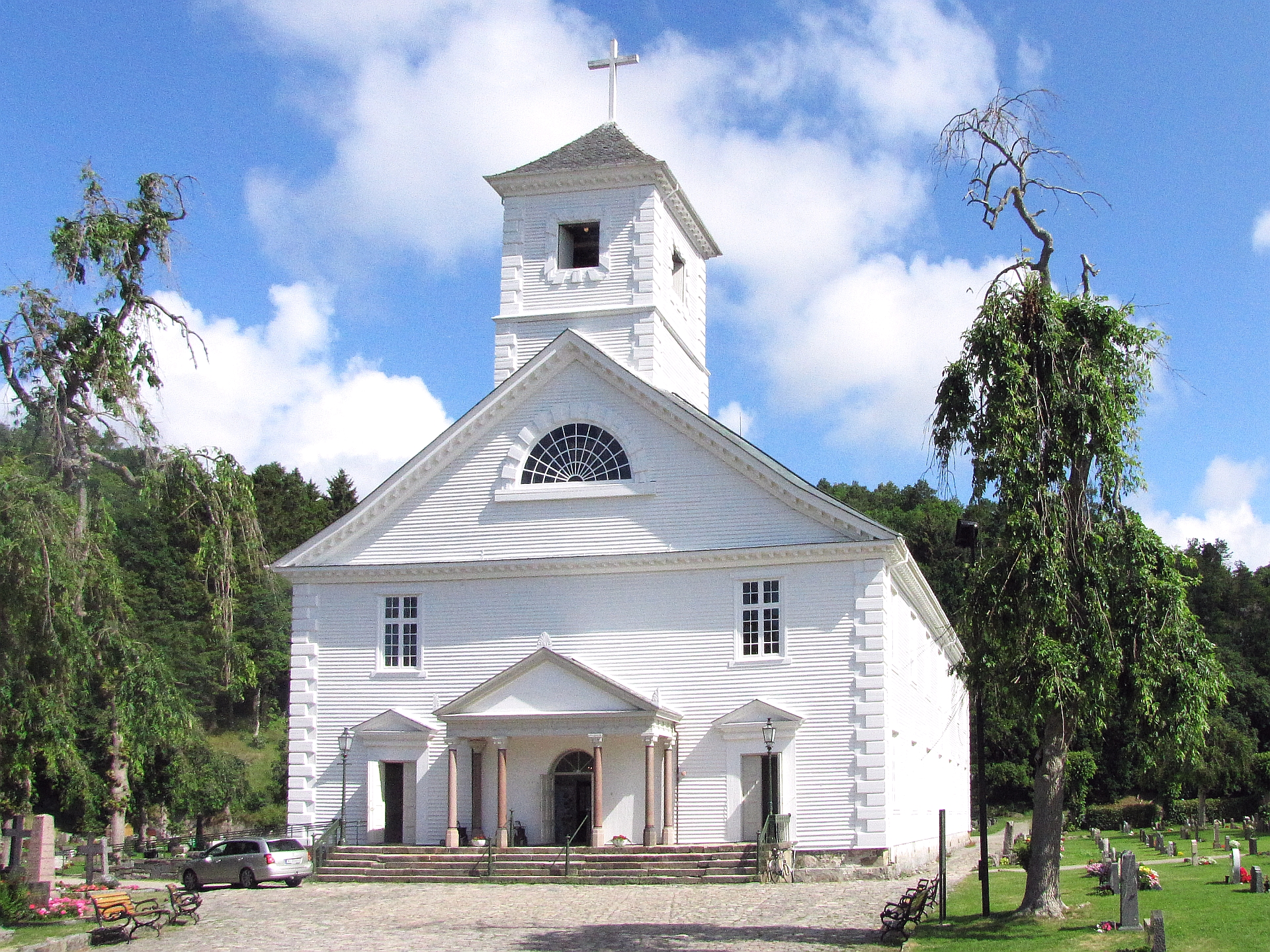 Mandal Kirche von 1821 mit 1800 Sitzplätzen die größte HOLZkirche in Norwegen Foto Wolfgang Pehlemann IMG_9319